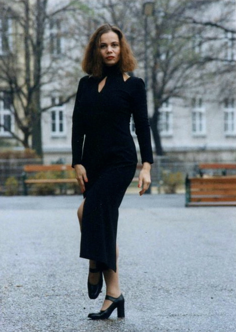 Judith Keller feat. Cuarteto Viena Tango CD Luz y sombra